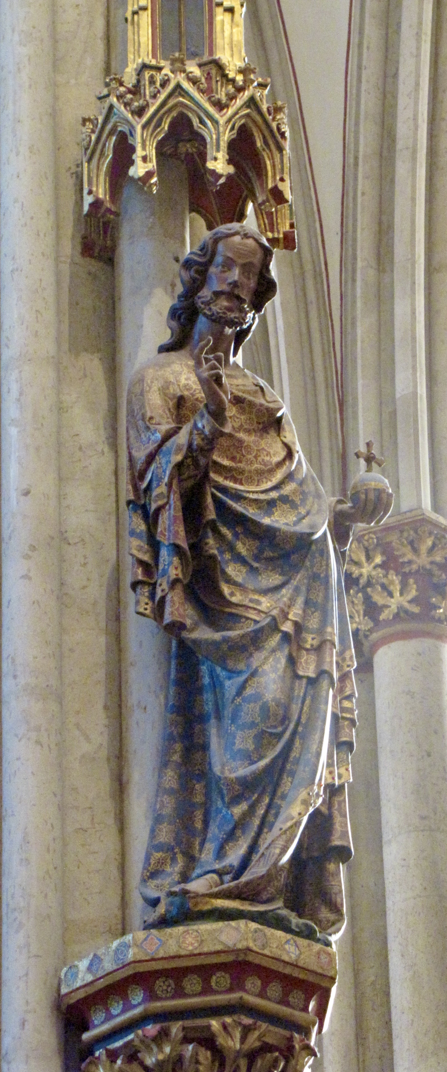 Kölner Dom: Christus. Eine der 14 Chorpfeilerfiguren, geschaffen zwischen 1320 und 1340 von der Kölner Dombauhütte unter Leitung von Dombaumeister Johannes. Tuffstein, bunt bemalt. Höhe der Figur: 2,15 Meter. Zählt zu den Hauptwerken Europäischer Bildhauerkunst im frühen 14. Jhd.